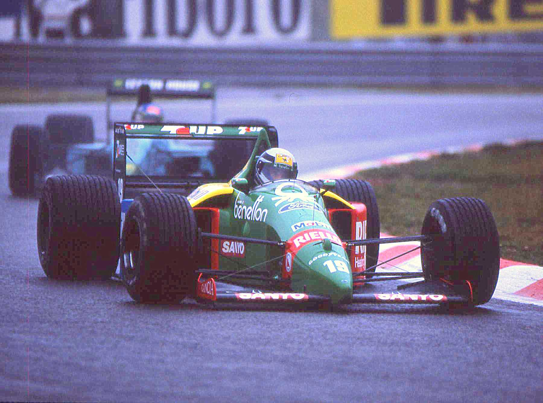 Alessandro Nannini - Benetton-Ford . Scan diapo argentique.